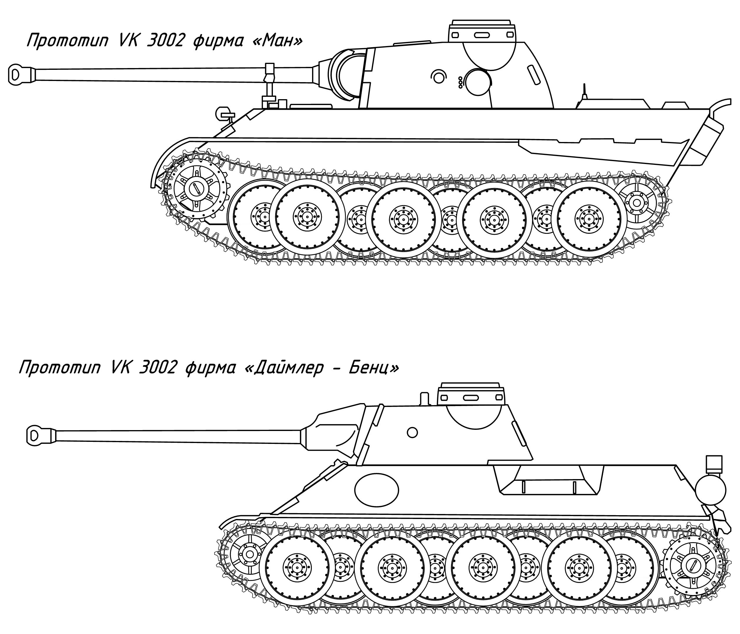 Прототипы фирм Ман и ДБ - боковые виды прототипов танка "Пантера"